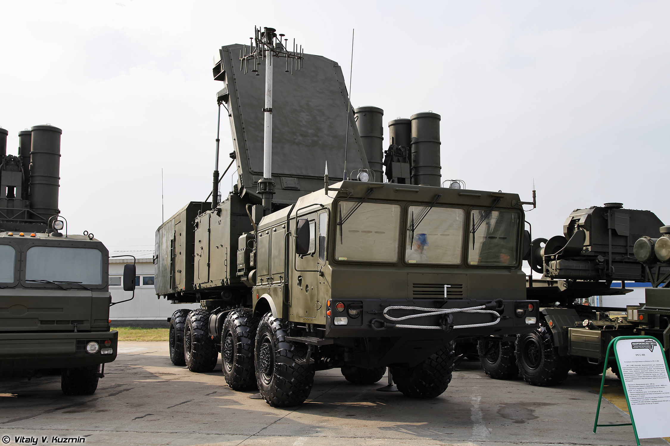 РПН 92Н2 и пусковая уставновка 5П85Т2 из состава ЗРС С-400 (92N2 radar and 5P85T2 from S-400)